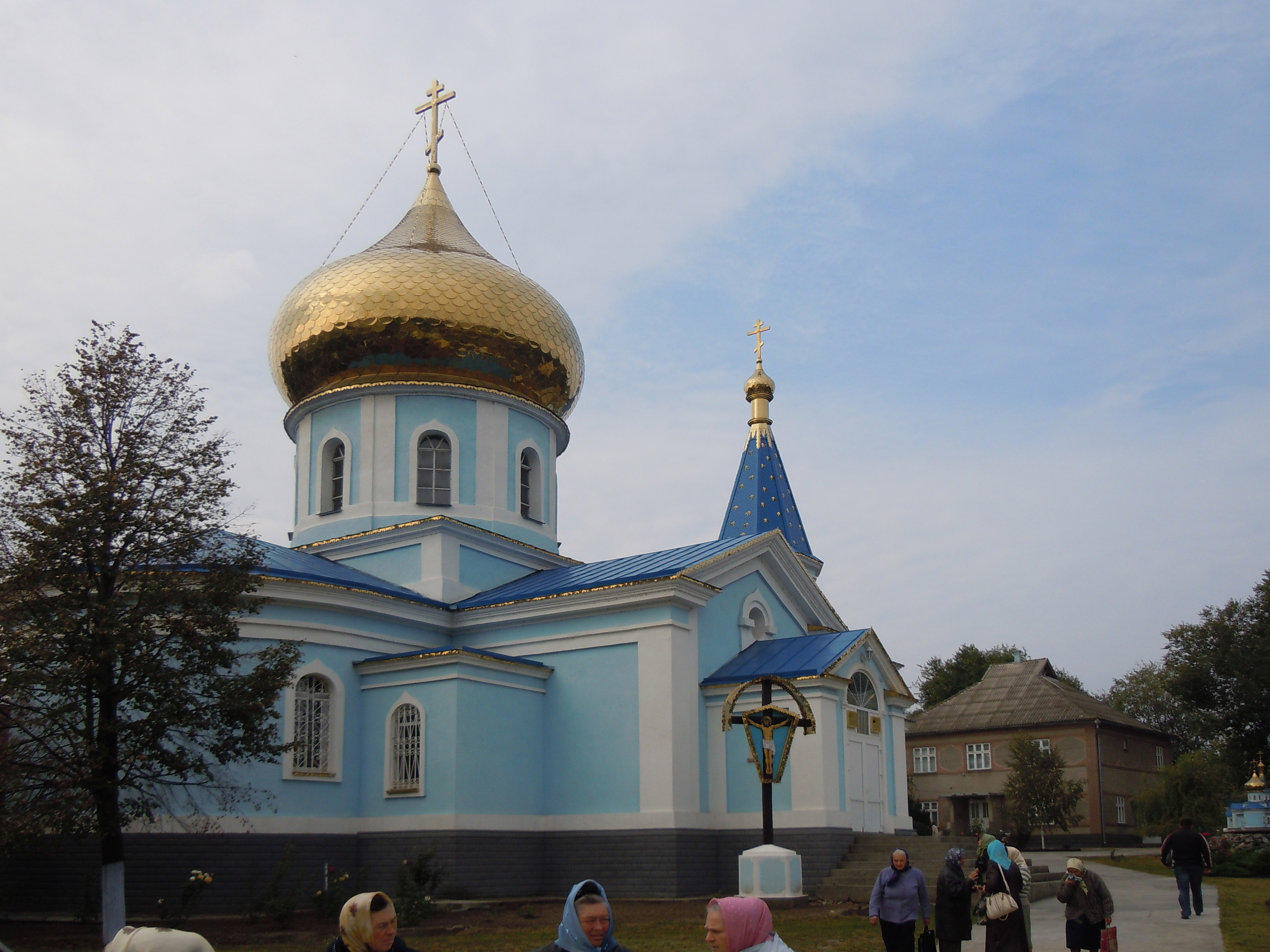 Церква Успіння, смт. Татарбунари